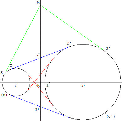 Axe radical de deux cercles